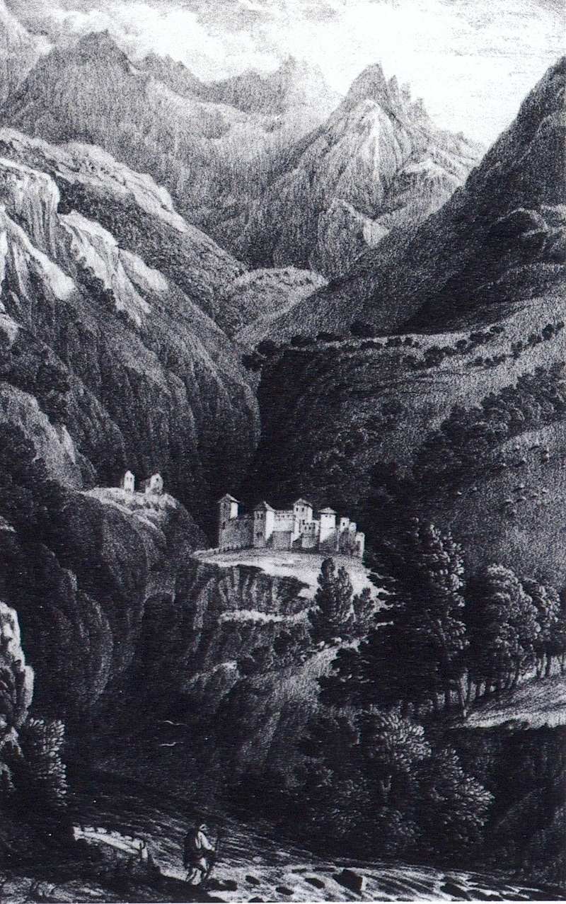 Litografia del Castello di Quart, in Valle d'Aosta, del 1822-23. Originariamente pubblicata in J.P. Cockburn, Views in the Valley of Aosta drawn from nature... on stone by A. Aglio and T. Baynes, London, 1822-1823. Fotografia dalla litografia nella pubblicazione originale di L'Image, conservata ad Aosta, nell'Archivio fotografico della Sopraintendenza per i Beni Culturali. Scansione da Sandra Barberi, cit. di Patafisik.